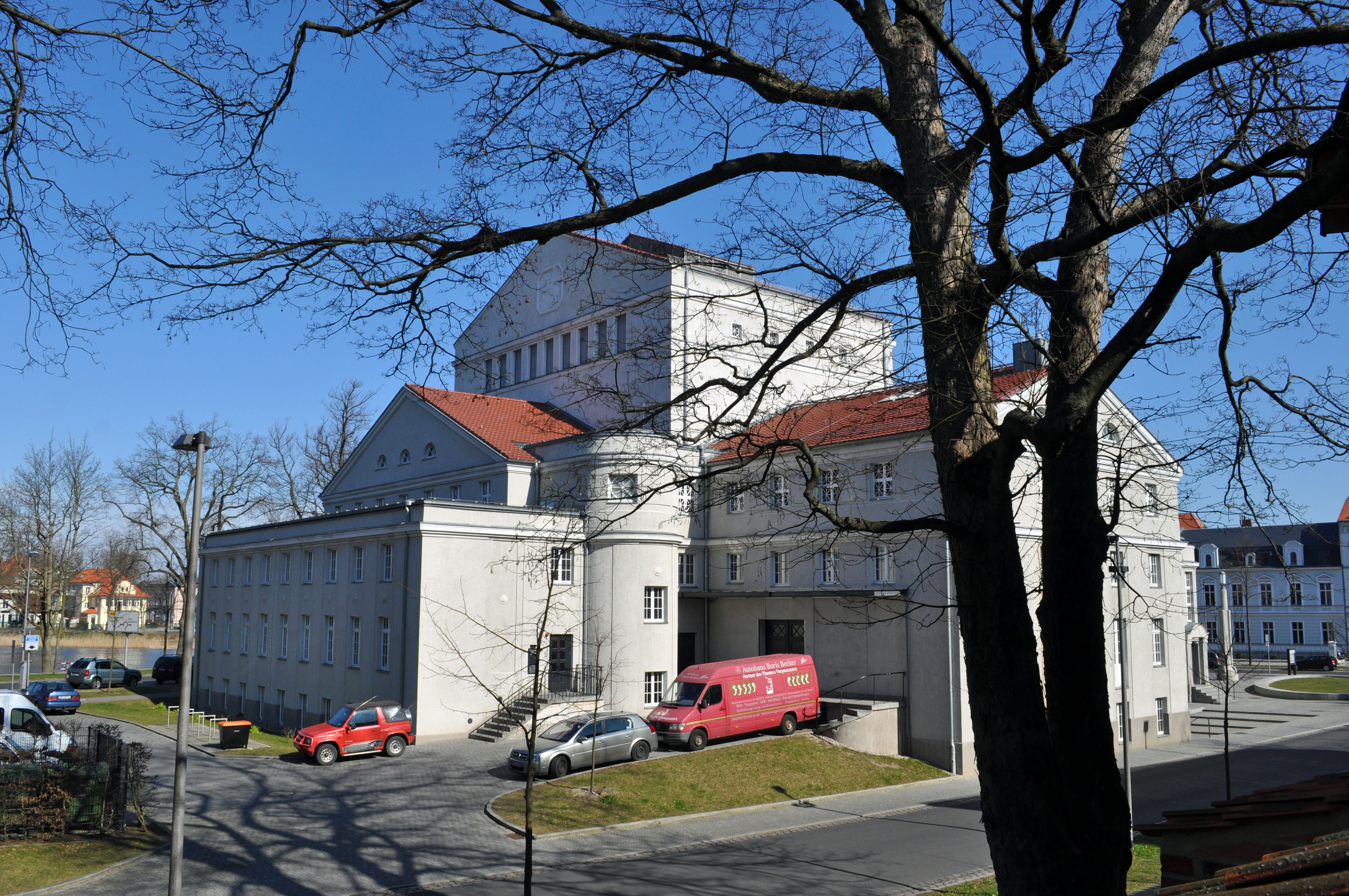 Gebäude bzw. Gebäudedetail in Stralsund. Straße und Hausnummer siehe Dateiname.